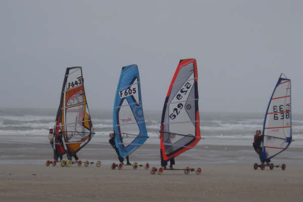 course de speed sail